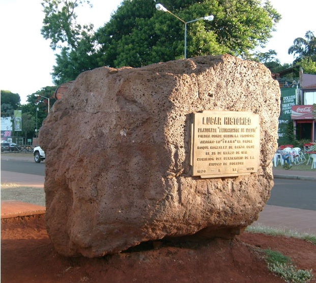 Piedra fundacional de la ciudad de Posadas, Provincia de Misiones, Argentina.